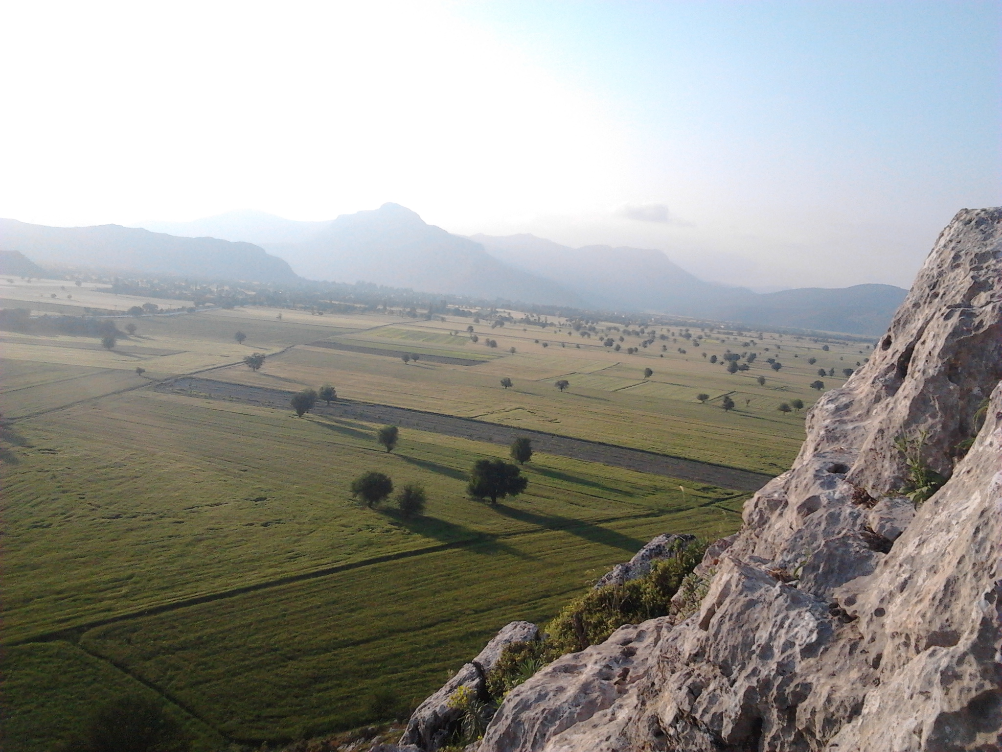 tarım arazileri